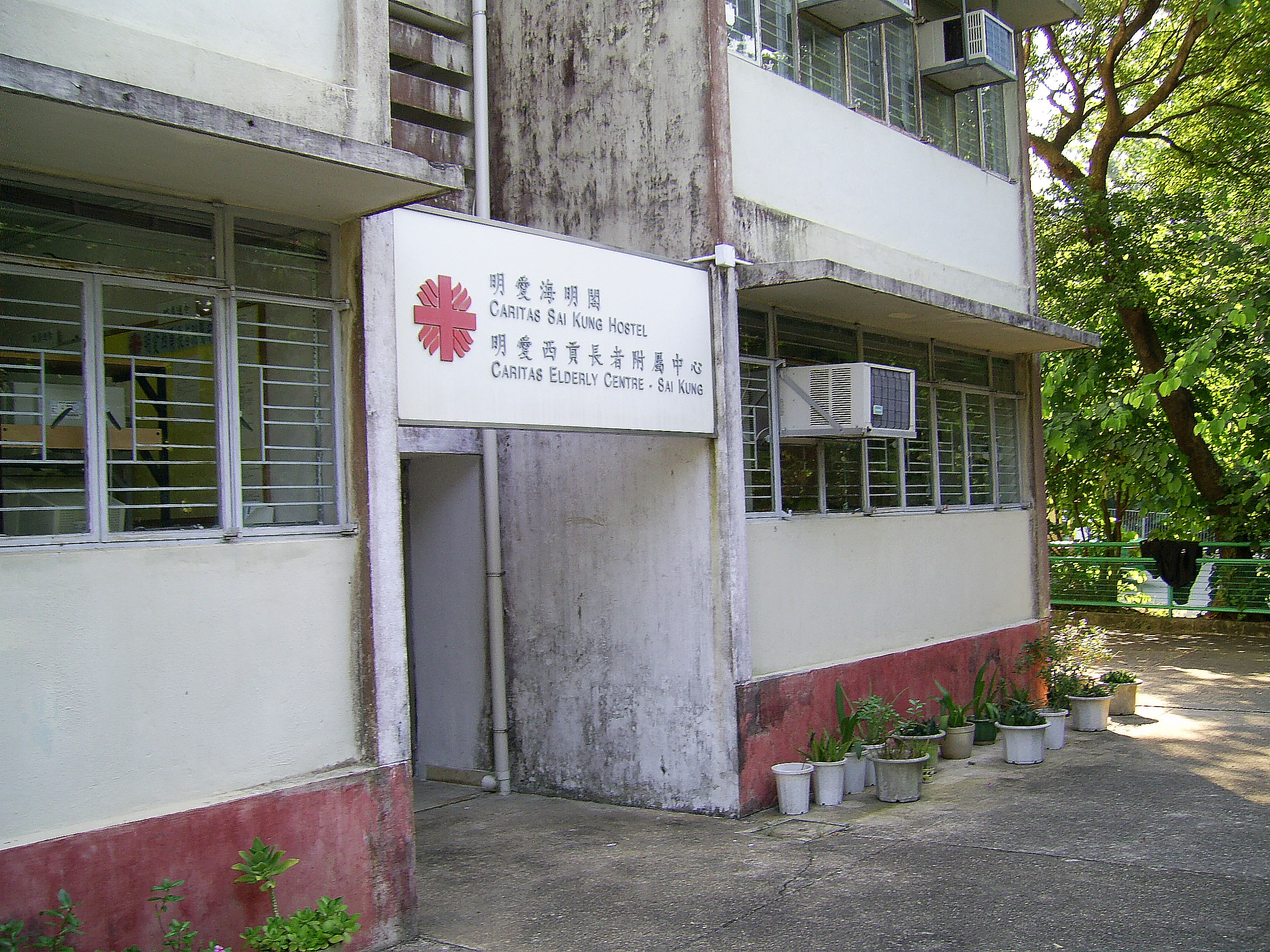 中文（香港）: 明愛海明閣